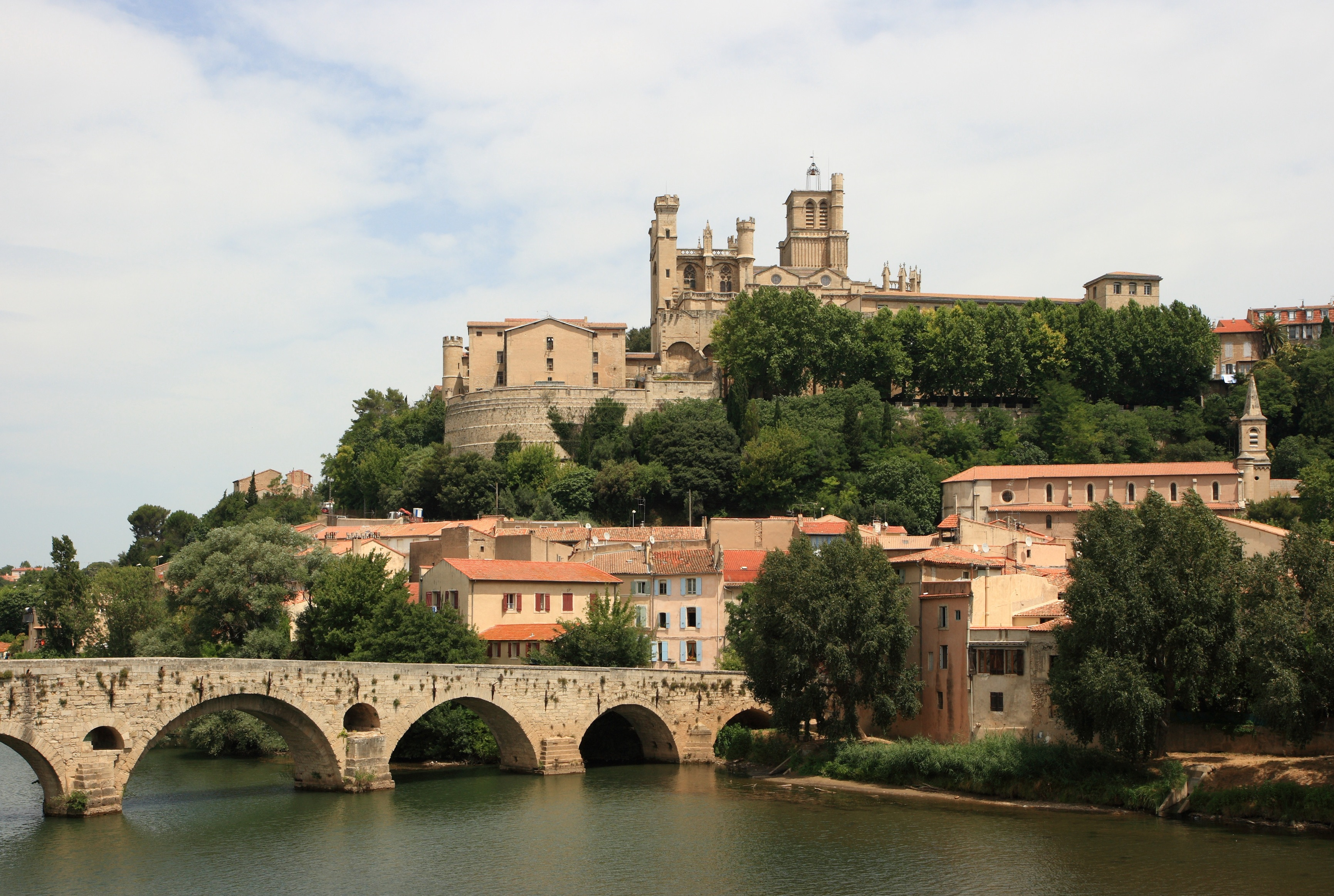 Vue de la cathédrale Saint-Nazaire de Béziers (Hérault) et du Pont Vieux sur l'Orb